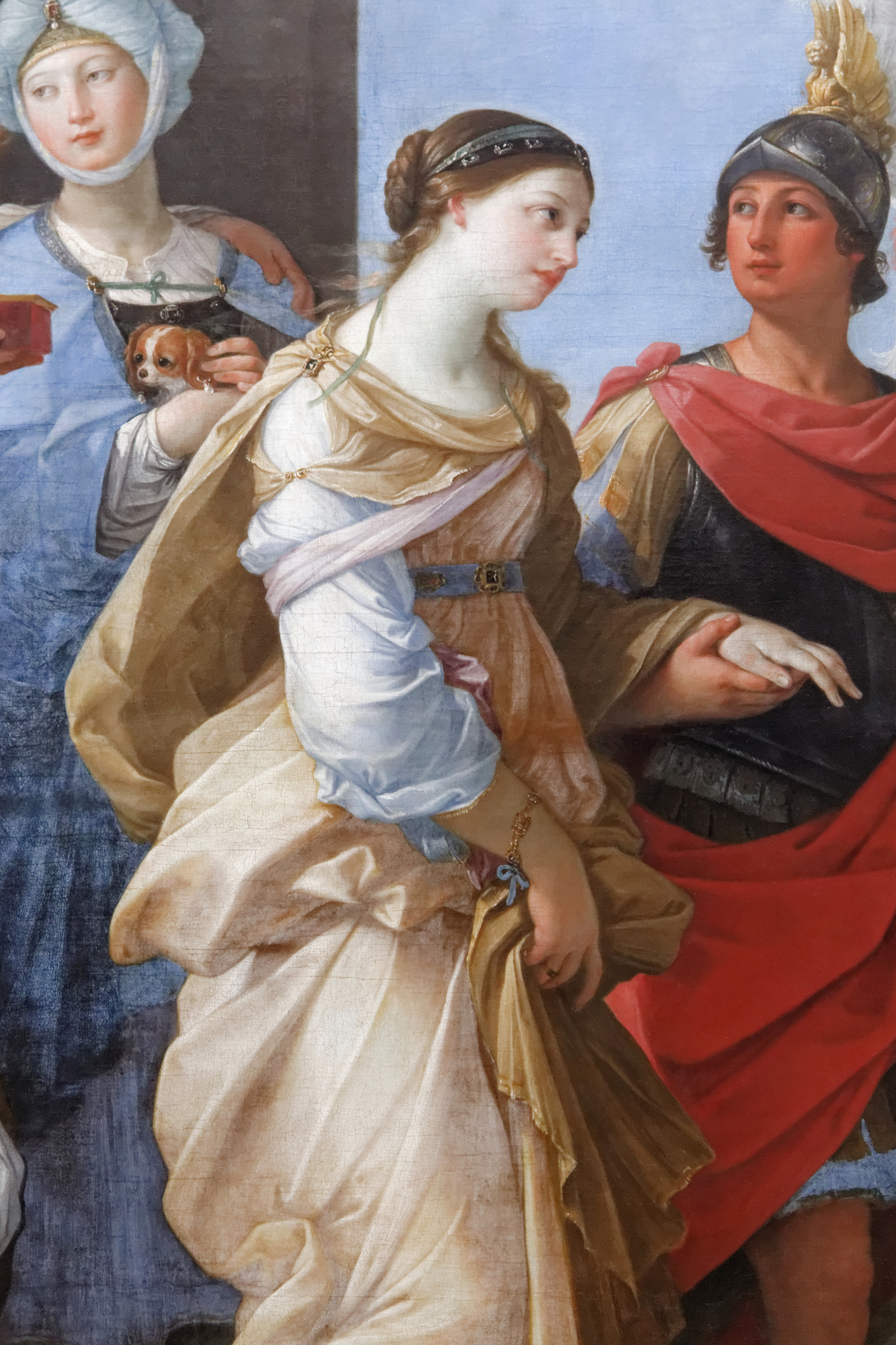 Hélène